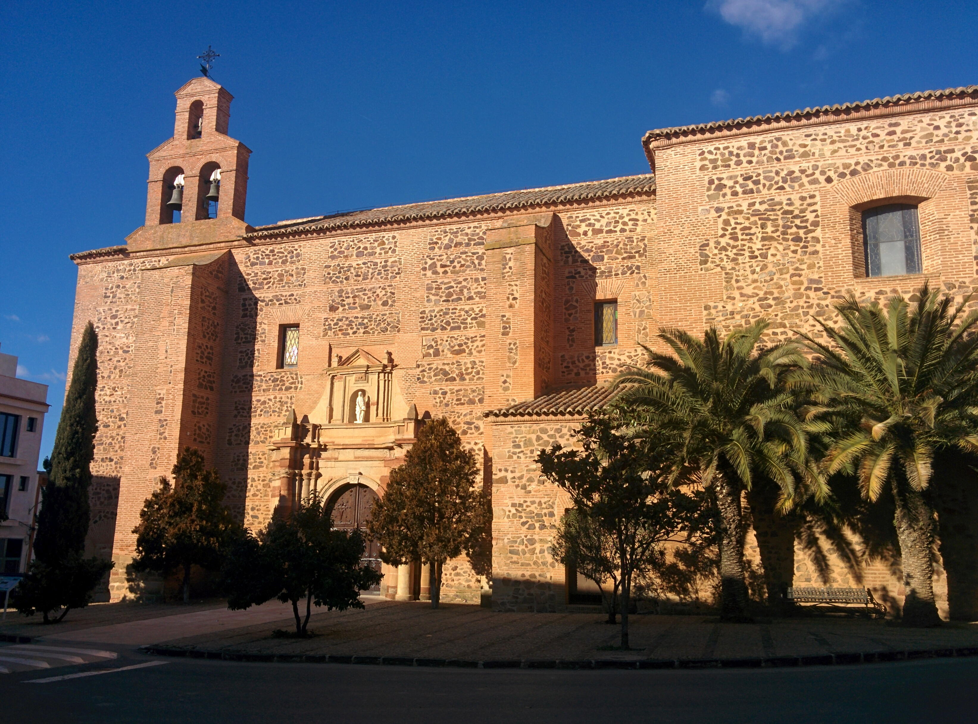 Iglesia de Santa Ana, en Castellar de Santiago (Ciudad Real, España).